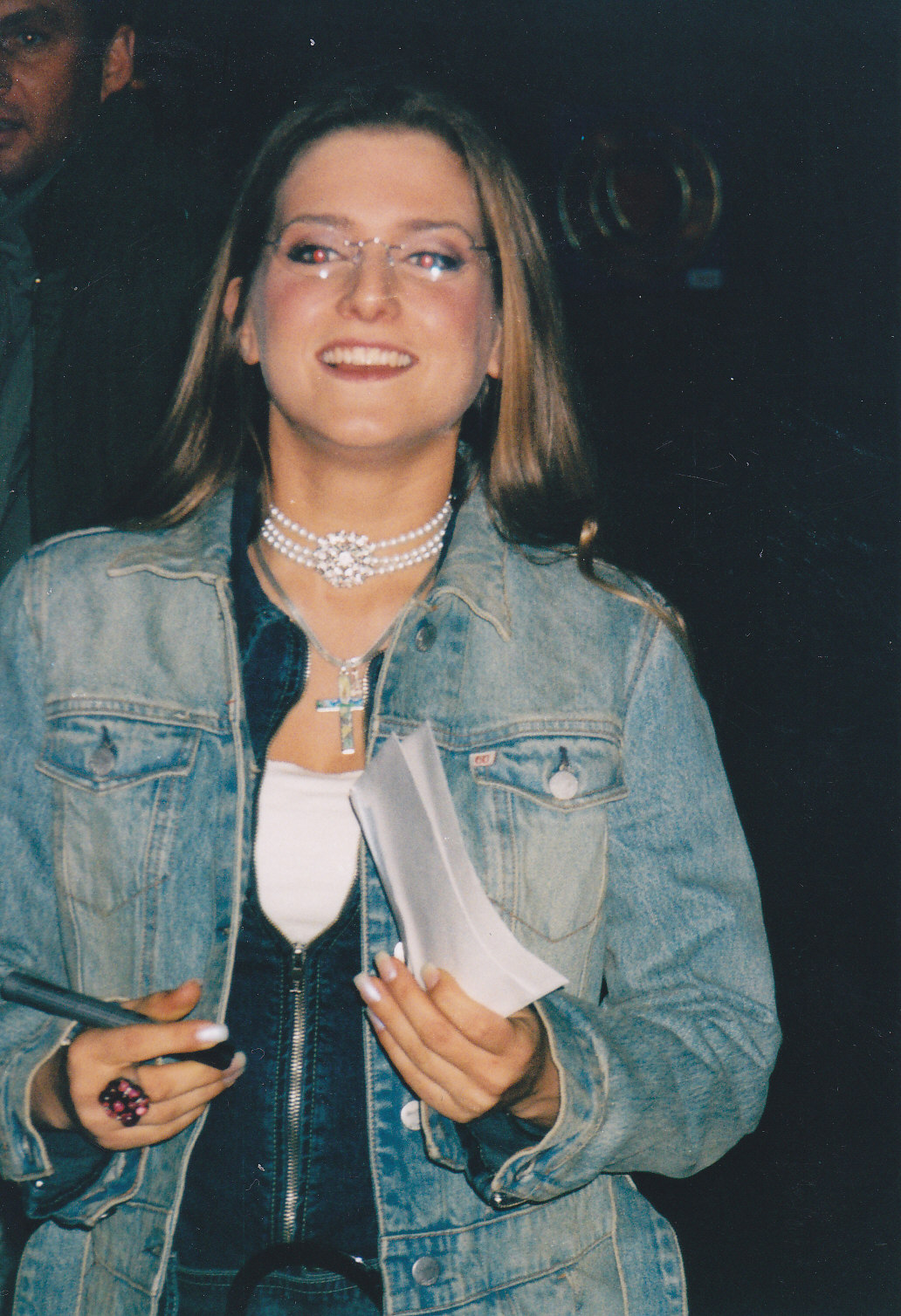 Jeanette (August 2002)